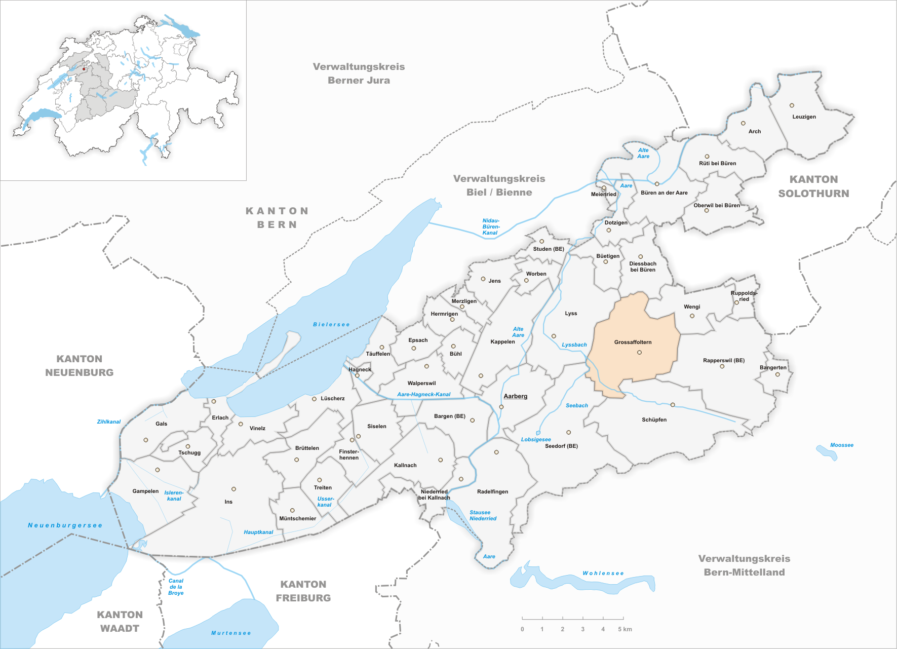 Municipality Grossaffoltern